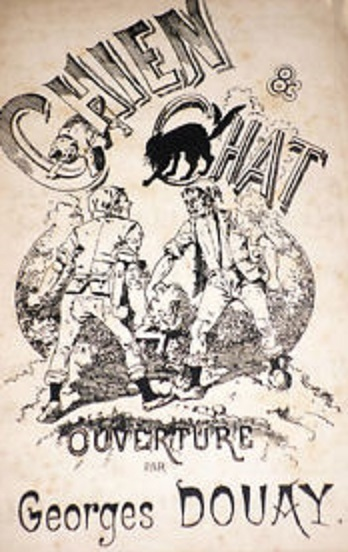 Chien et Chat, page de titre de l'ouverture de Georges Douay.